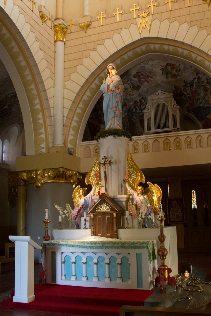 Šiluvos koplyčios vidus 2013 m. (Raseinių rajonas)